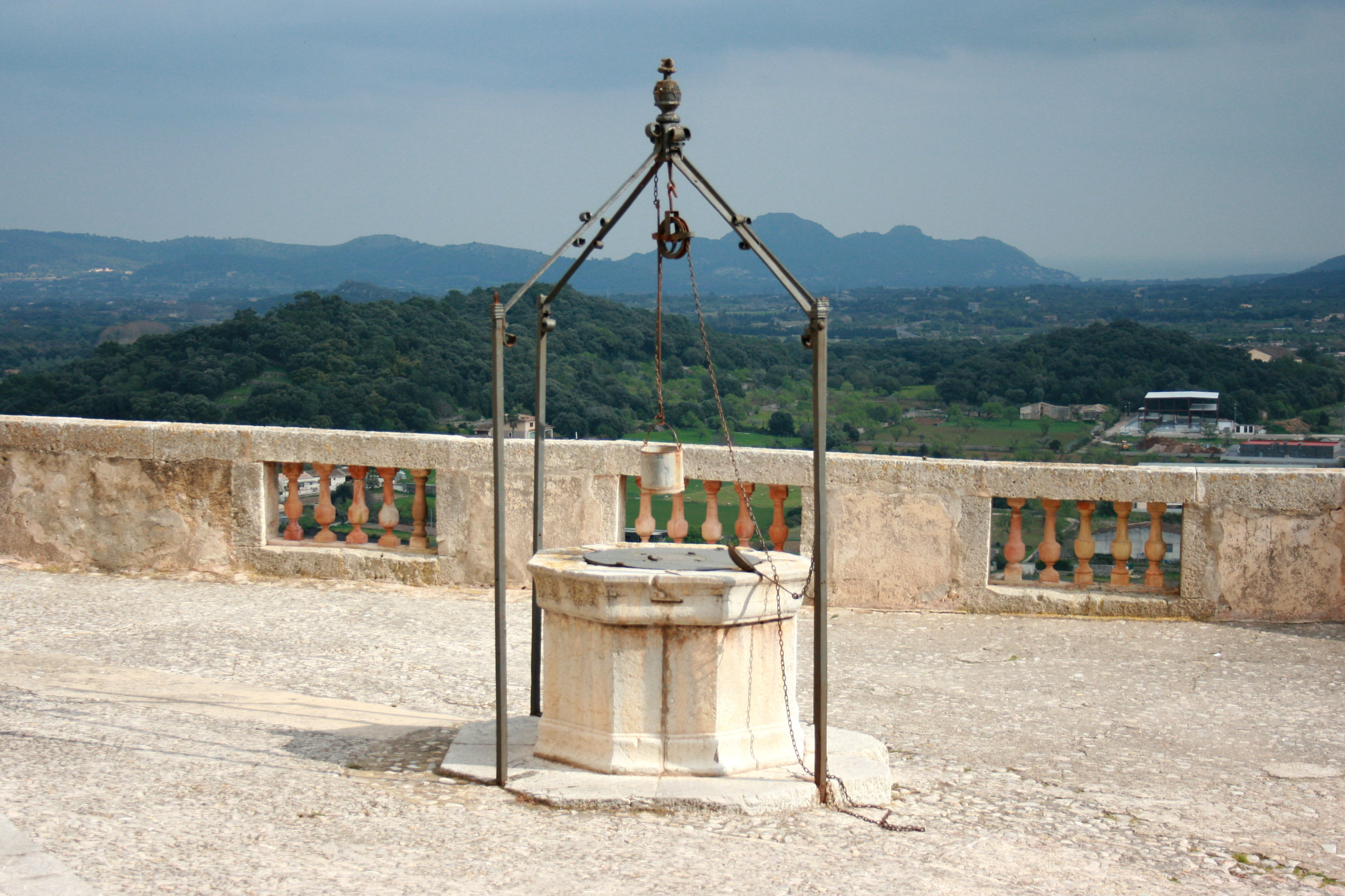 Zisterne von Sant Salvador d’Artà, Mallorca